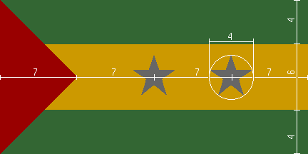 Design du drapeau de STP. Source.